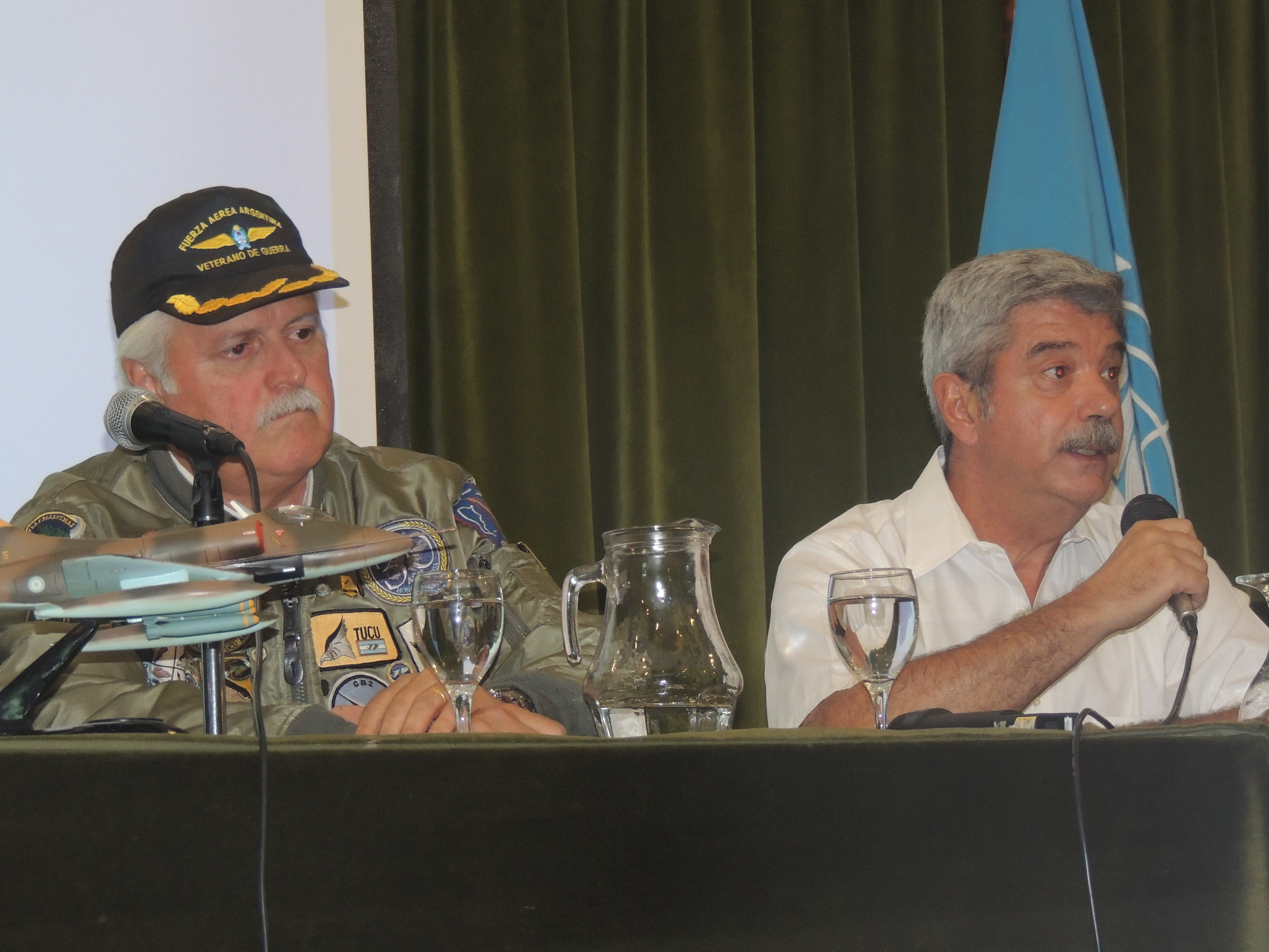 Luis "Tucu" Cervera y Hector "Pipi" Sanchez durante una charla en la Universidad Kennedy